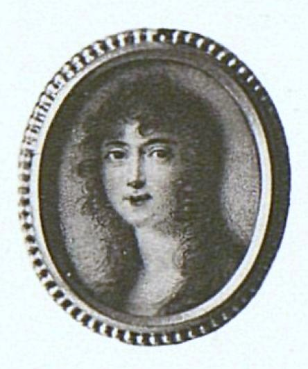 Анна Николаевна Пиотровская, ур. Соболевская, во втором браке за А. А. Чесменским.